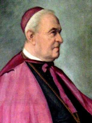 Gyula Meszlényi 1832-1905, Bishop of Satu mare 1887-1905